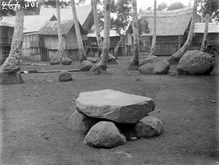 Negatief. Megalitisch grafmonument in Goenoengmegang